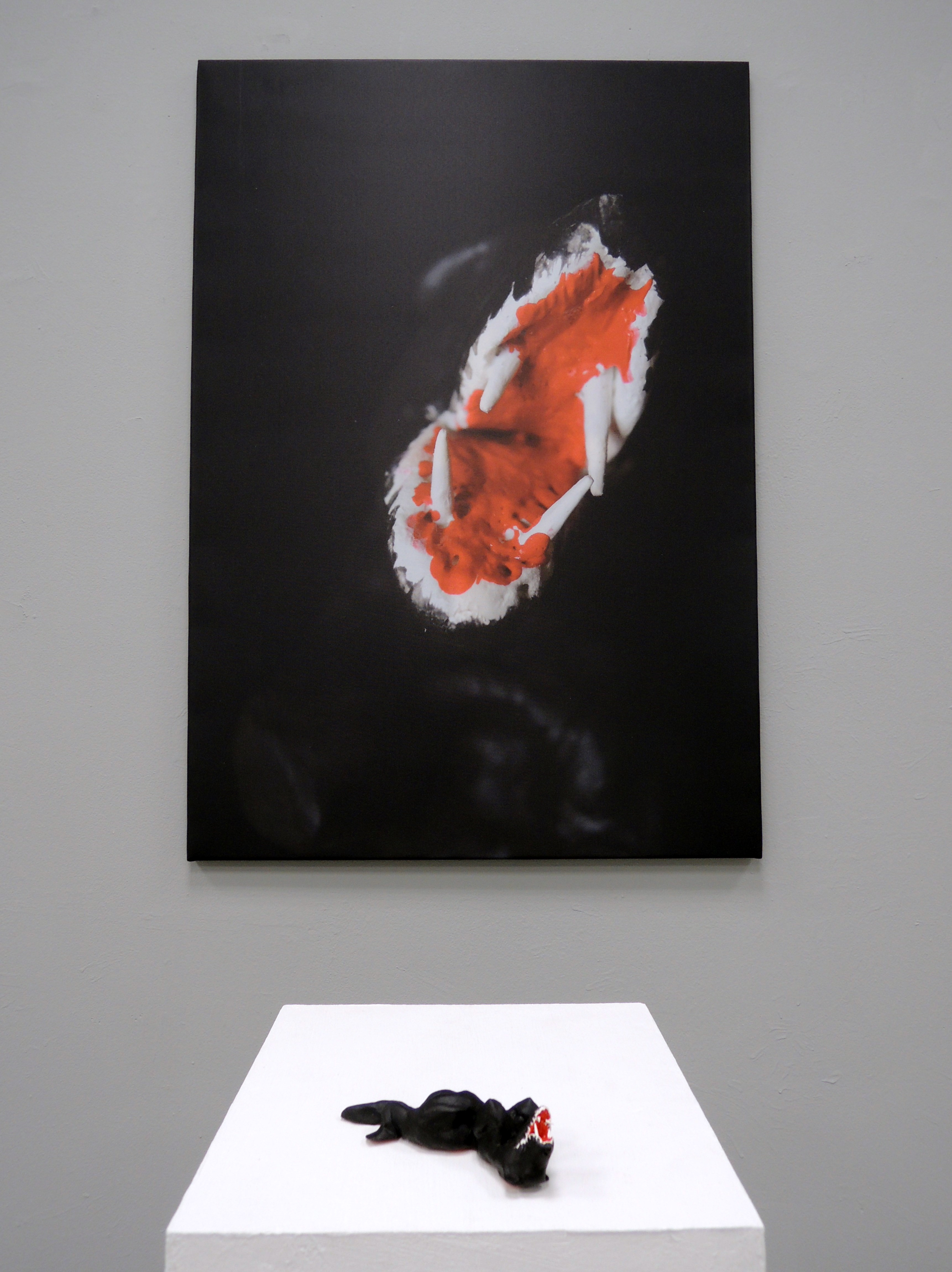 Birgit Kahle 'La belle et la bête' 2015 Birgit Kahle (1957–) DescriptionGerman artistDate of birth 1957 Location of birth Cologne Work period1980-Work location Germany, ItalyAuthority control : Q28736363 VIAF: 10472521 ISNI: 0000 0001 0777 1498 ULAN: 500115319 LCCN: nr96017659 GND: 171939824 WorldCat creator QS:P170,Q28736363